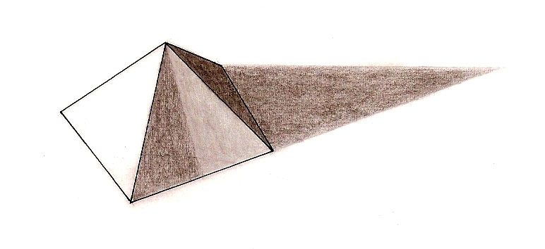 Concavité des faces de la pyramide de Khéops